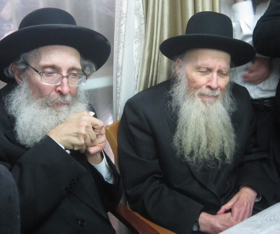 הרב אריה פינקל (מימין) עם הרב נתן צבי פינקל